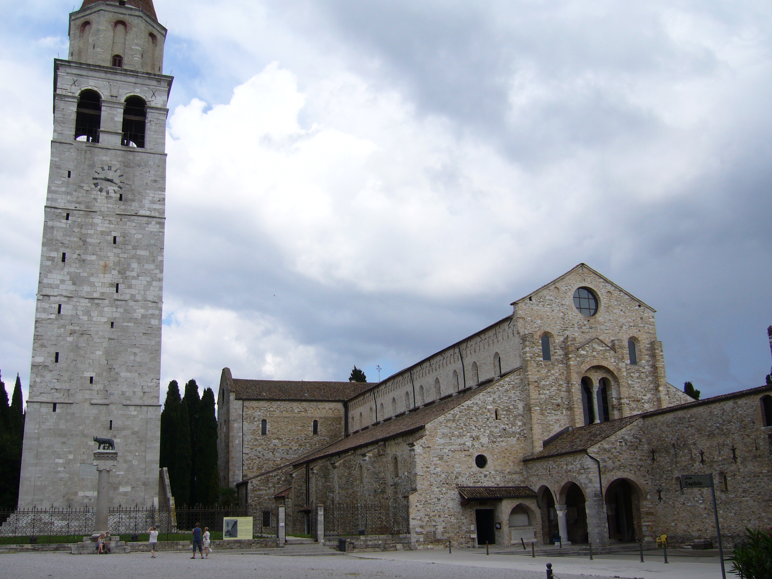 Aquileia, Basilica patriarcale. Esterno.